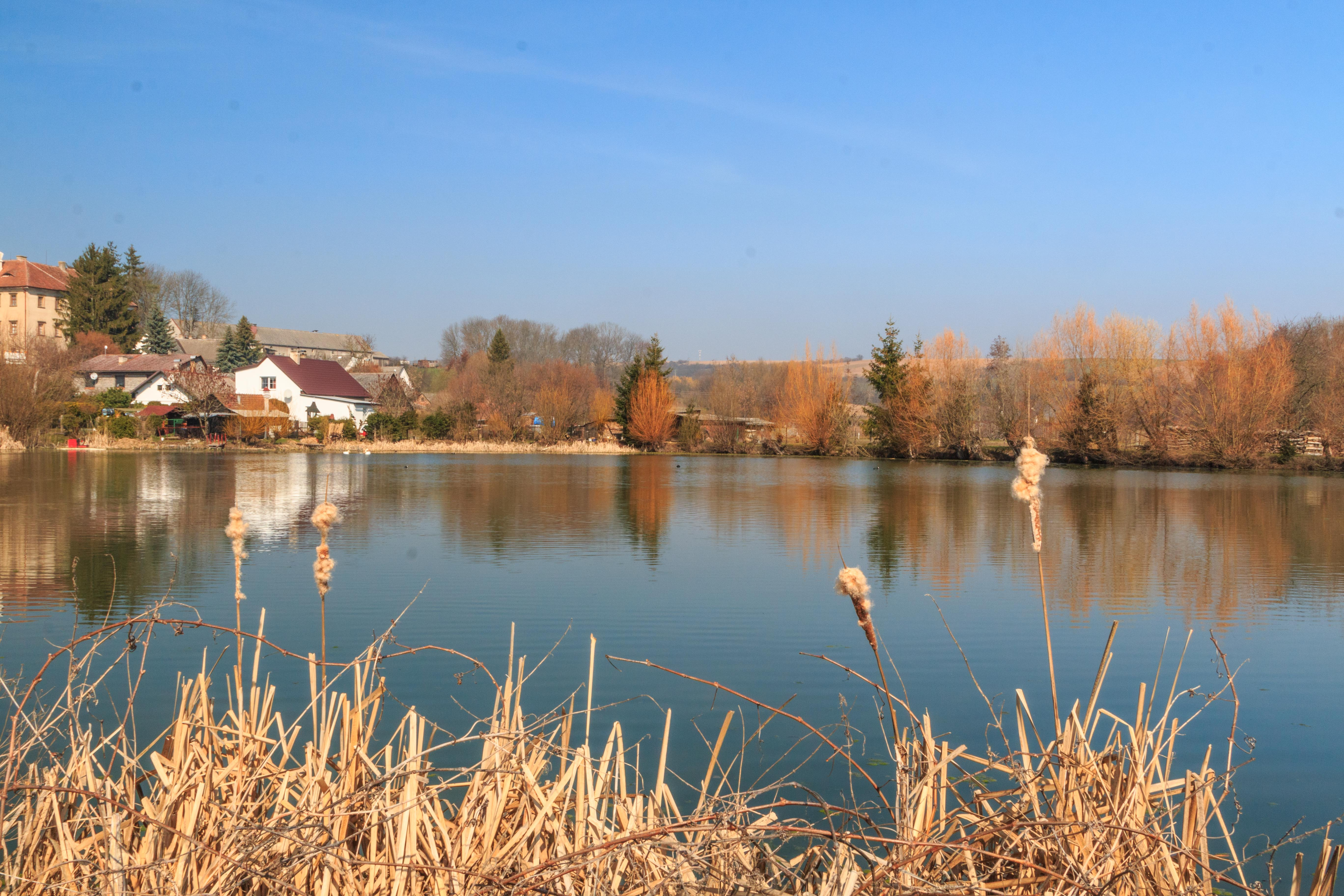 Starohradský rybník